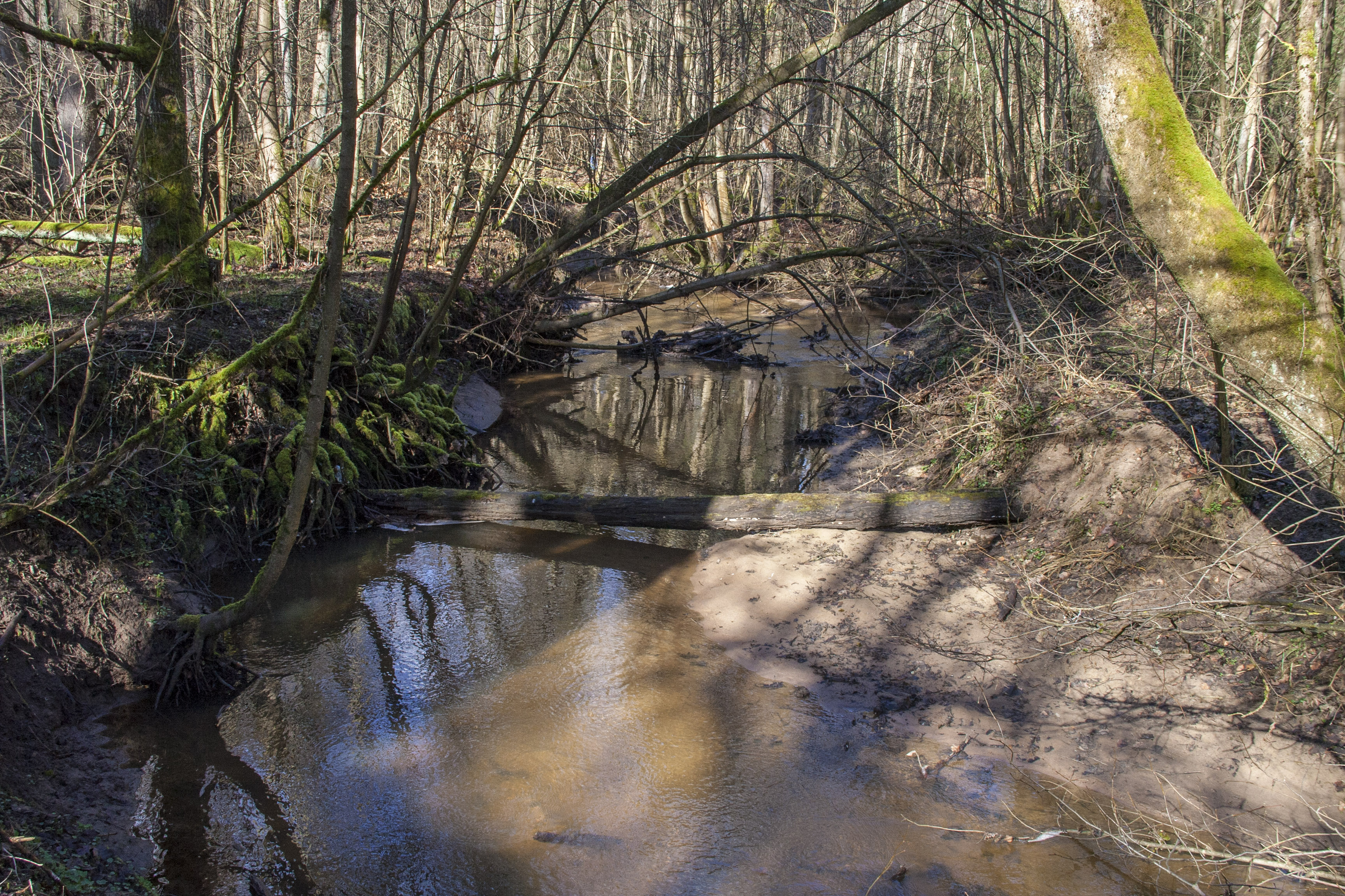 Gründlach, Prallhang, Heroldsberg